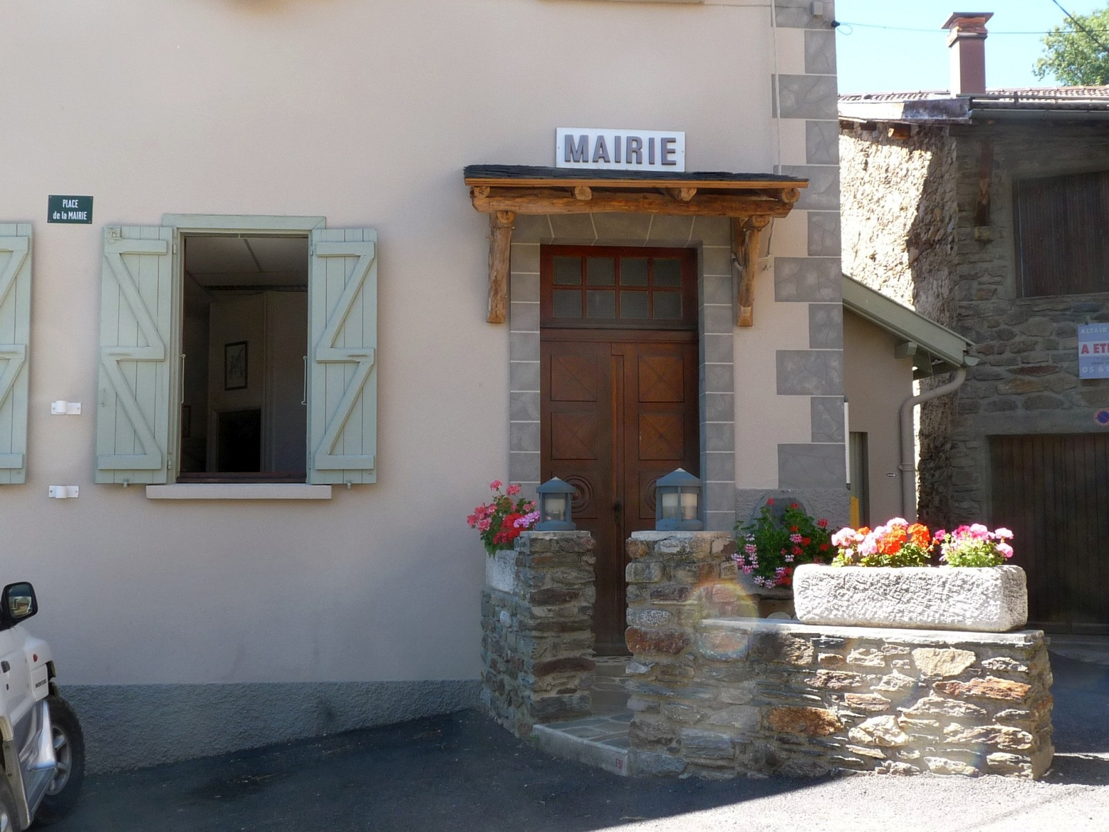 Mairie d'Ascou, Ariège, France